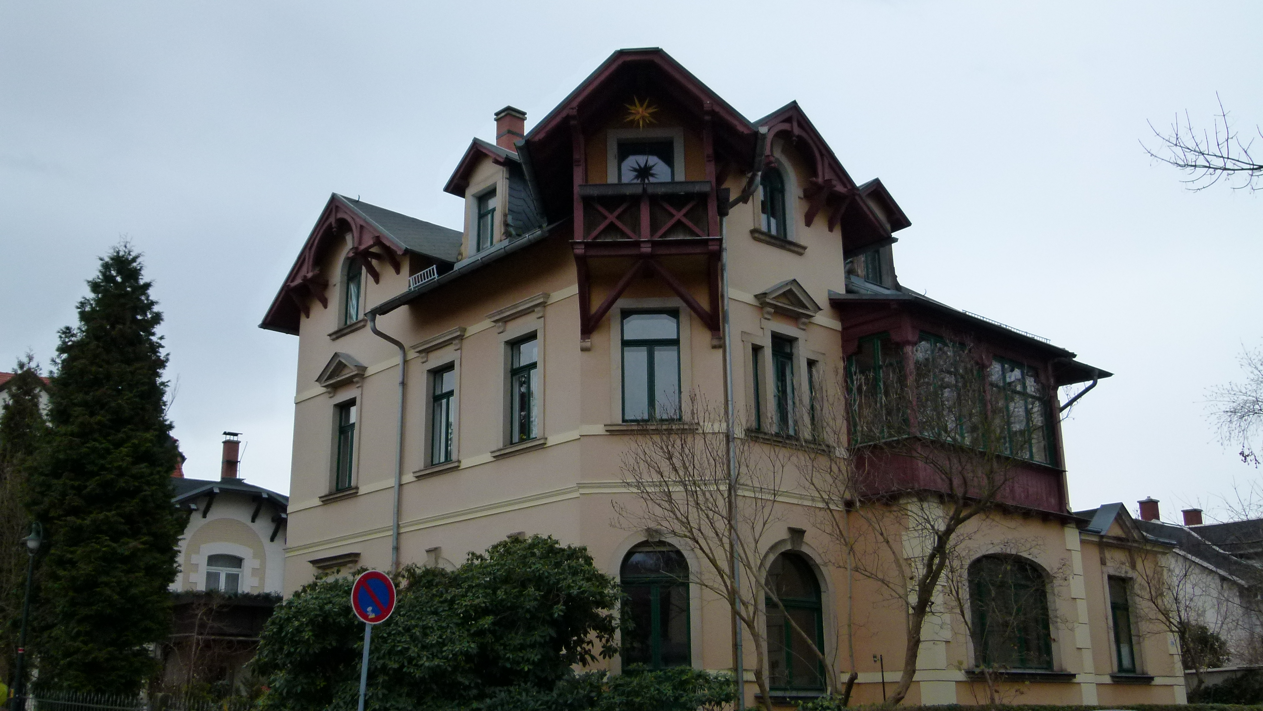 Denkmalgeschütztes Haus, Luboldtstraße 24, Weißer Hirsch, Dresden